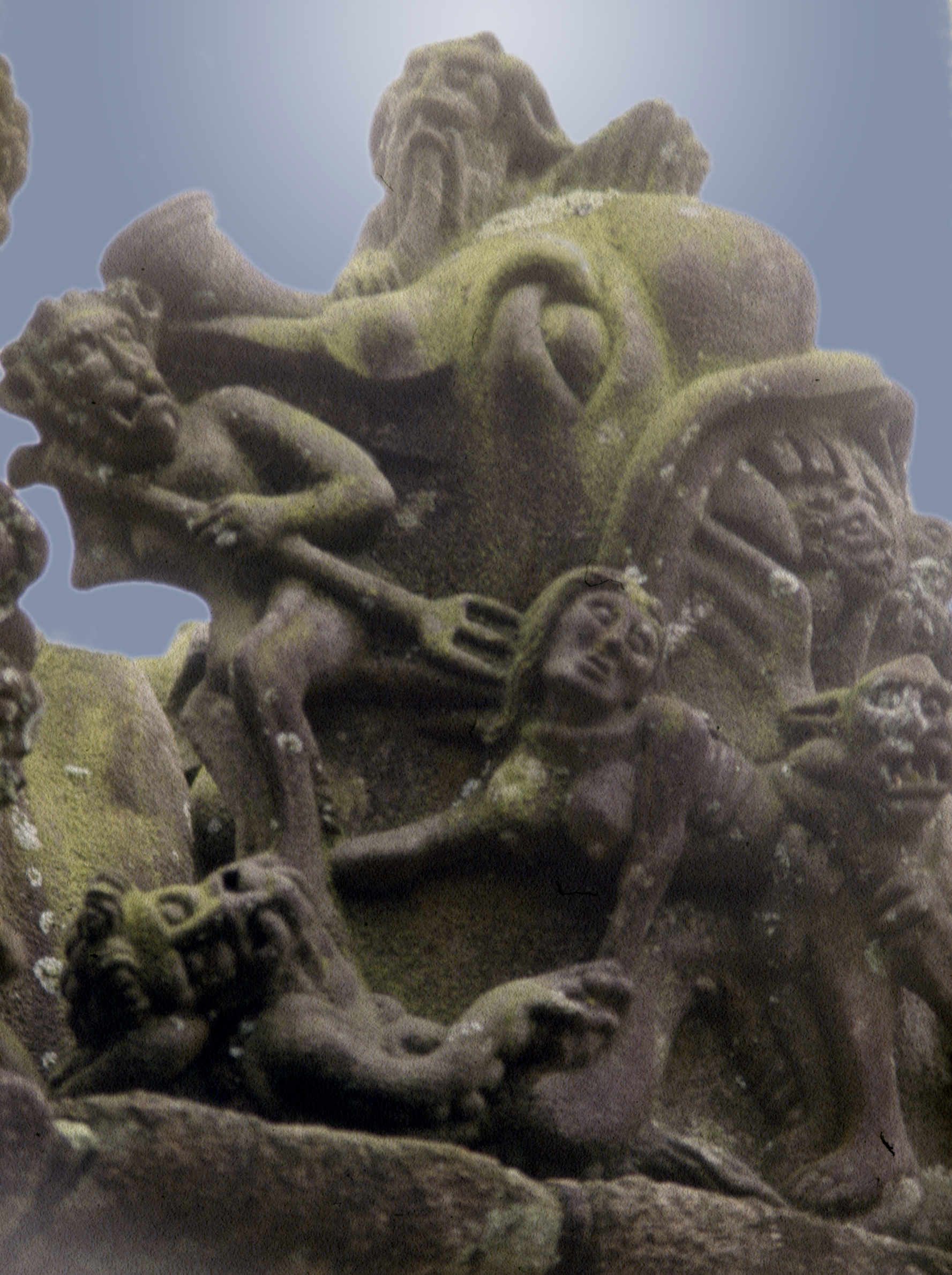 Guimiliau